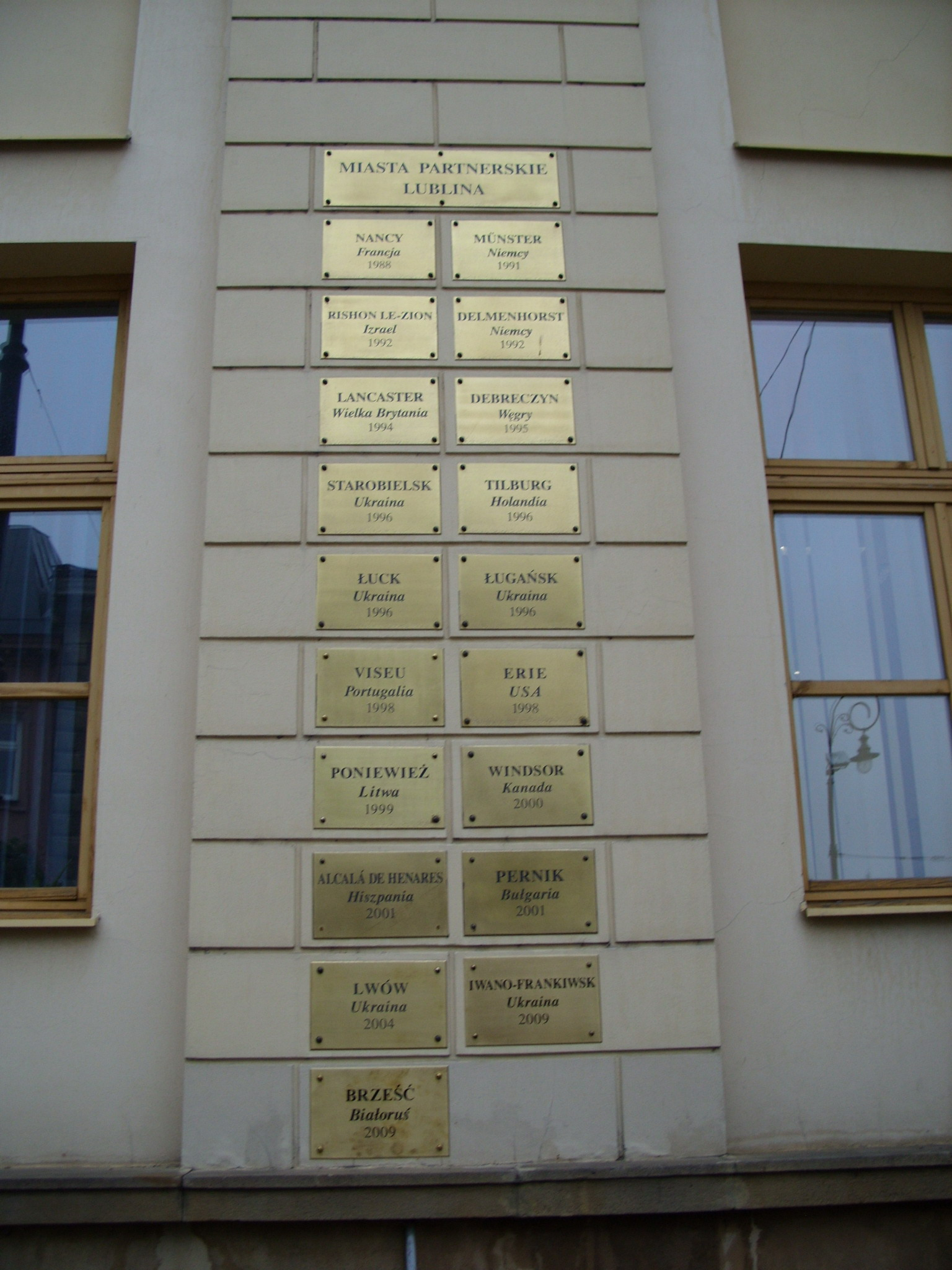 Testvérvárosok táblái a városháza oldalán (Lublin, Lengyelország)